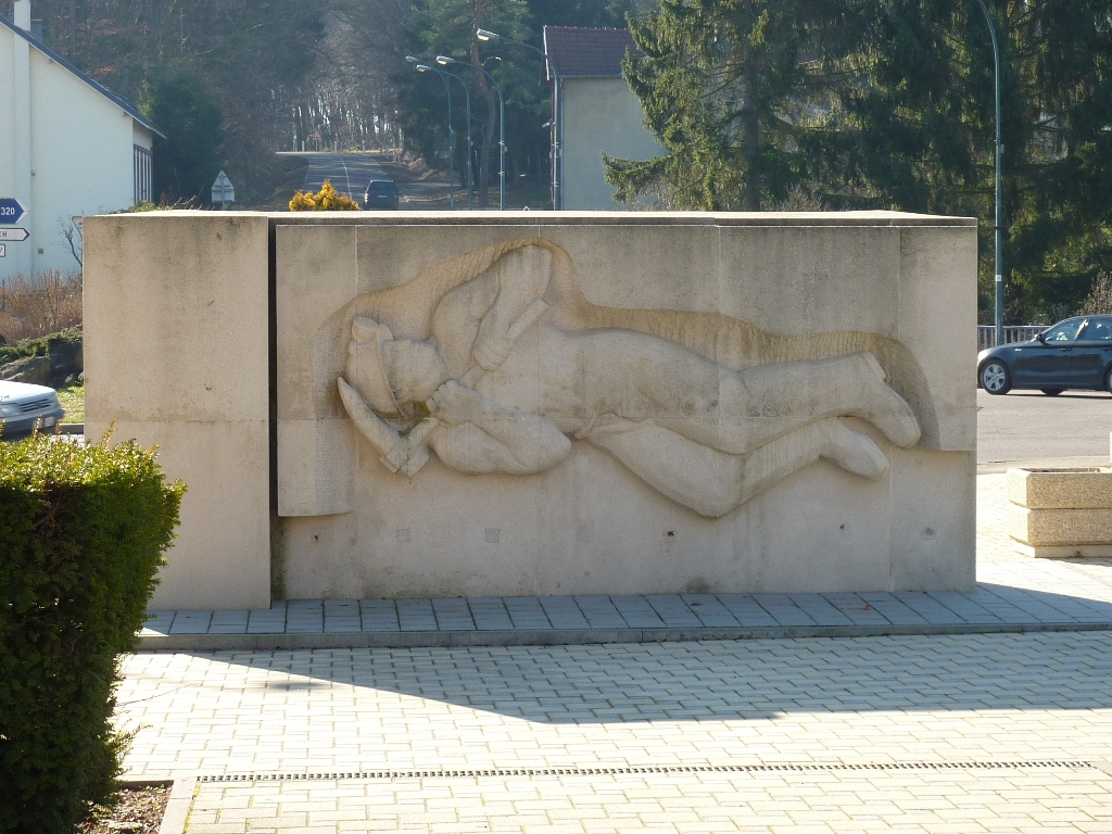 monument de mineur